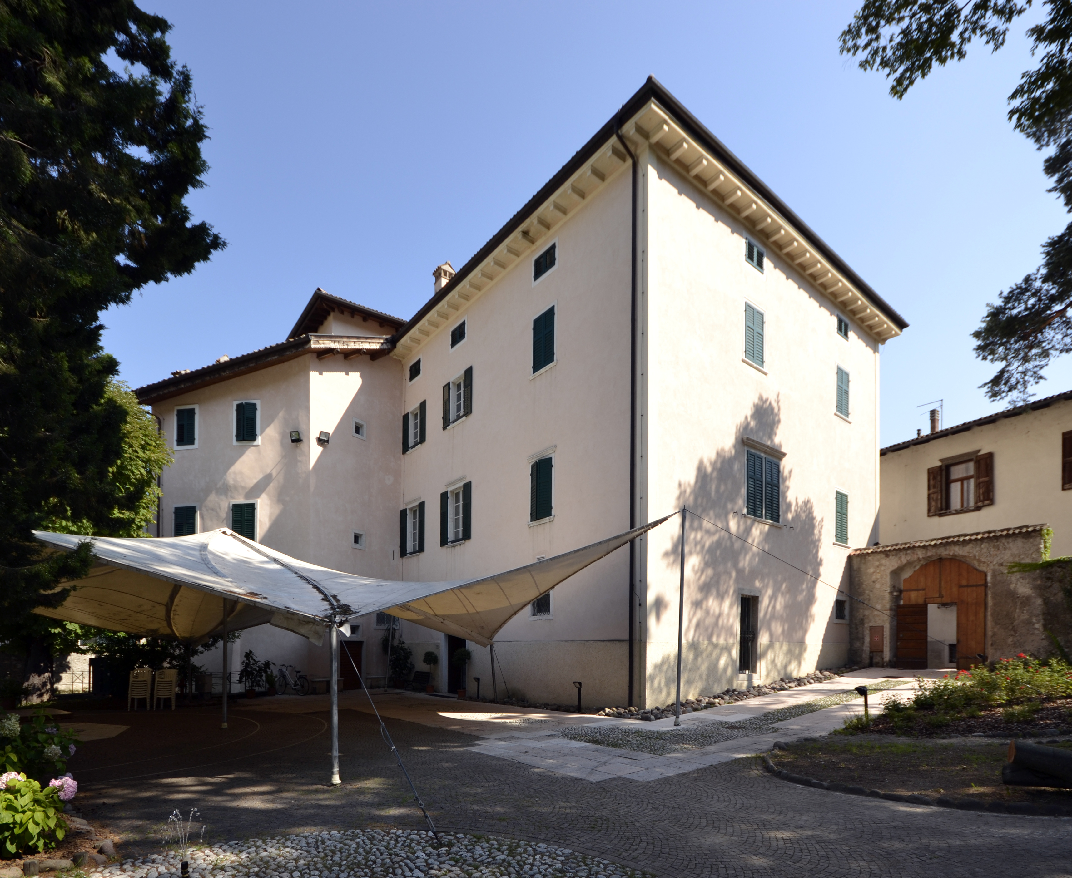 Sede distaccata del Museo Diocesano Tridentino, situata a Villa Lagarina